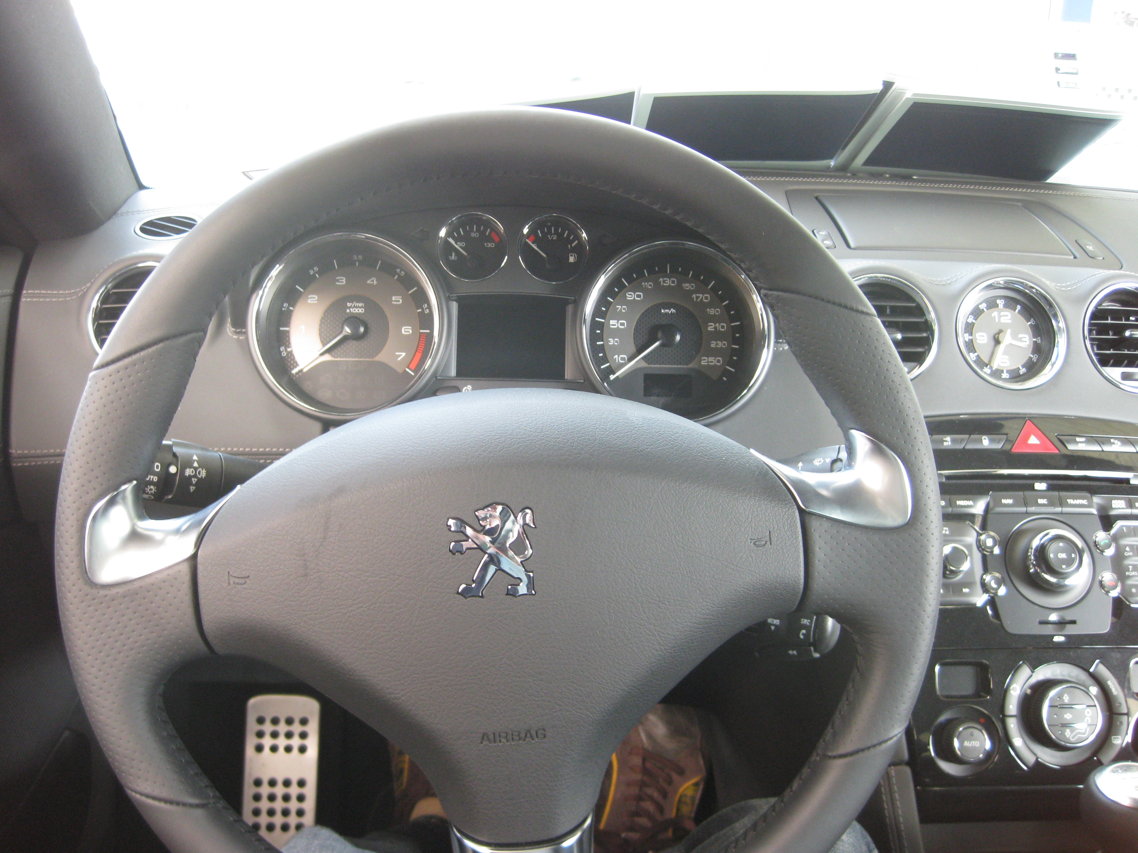 Peugeot RCZ Cockpitansicht